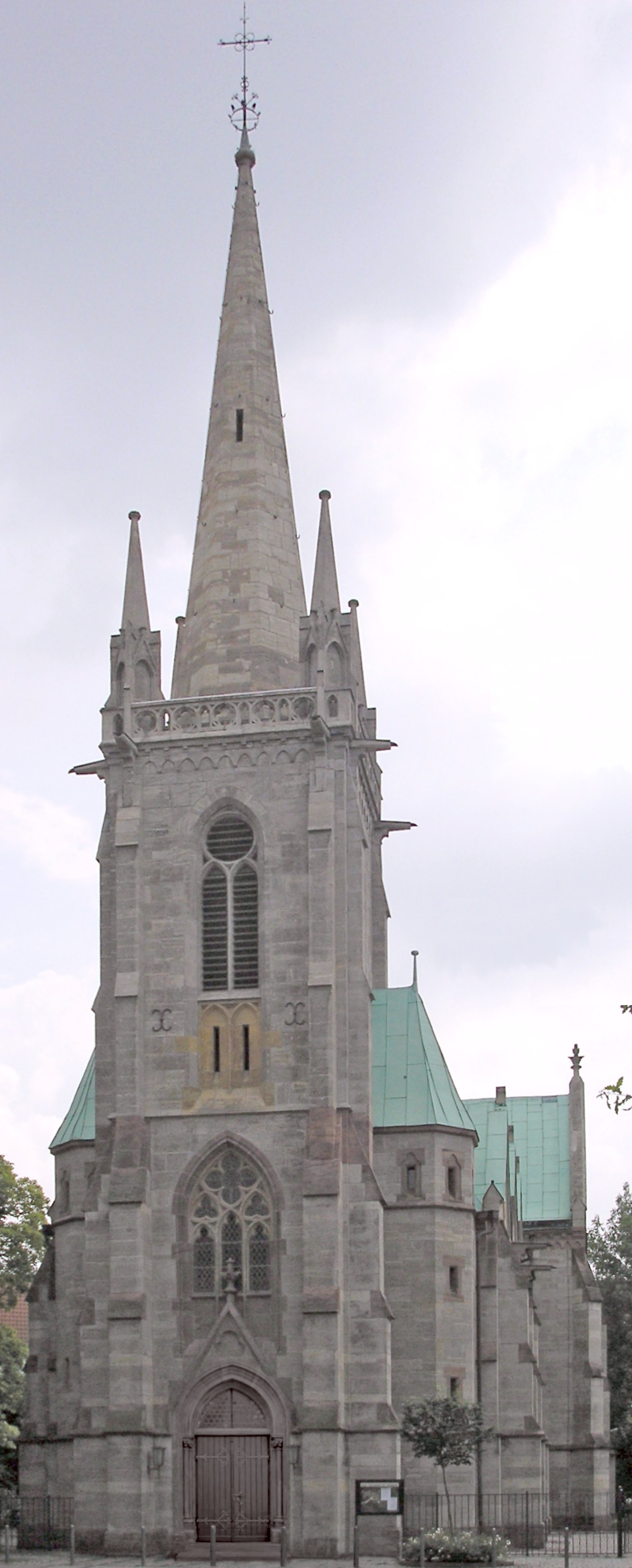 Eisenach, Kath. Kirche St. Elisabeth